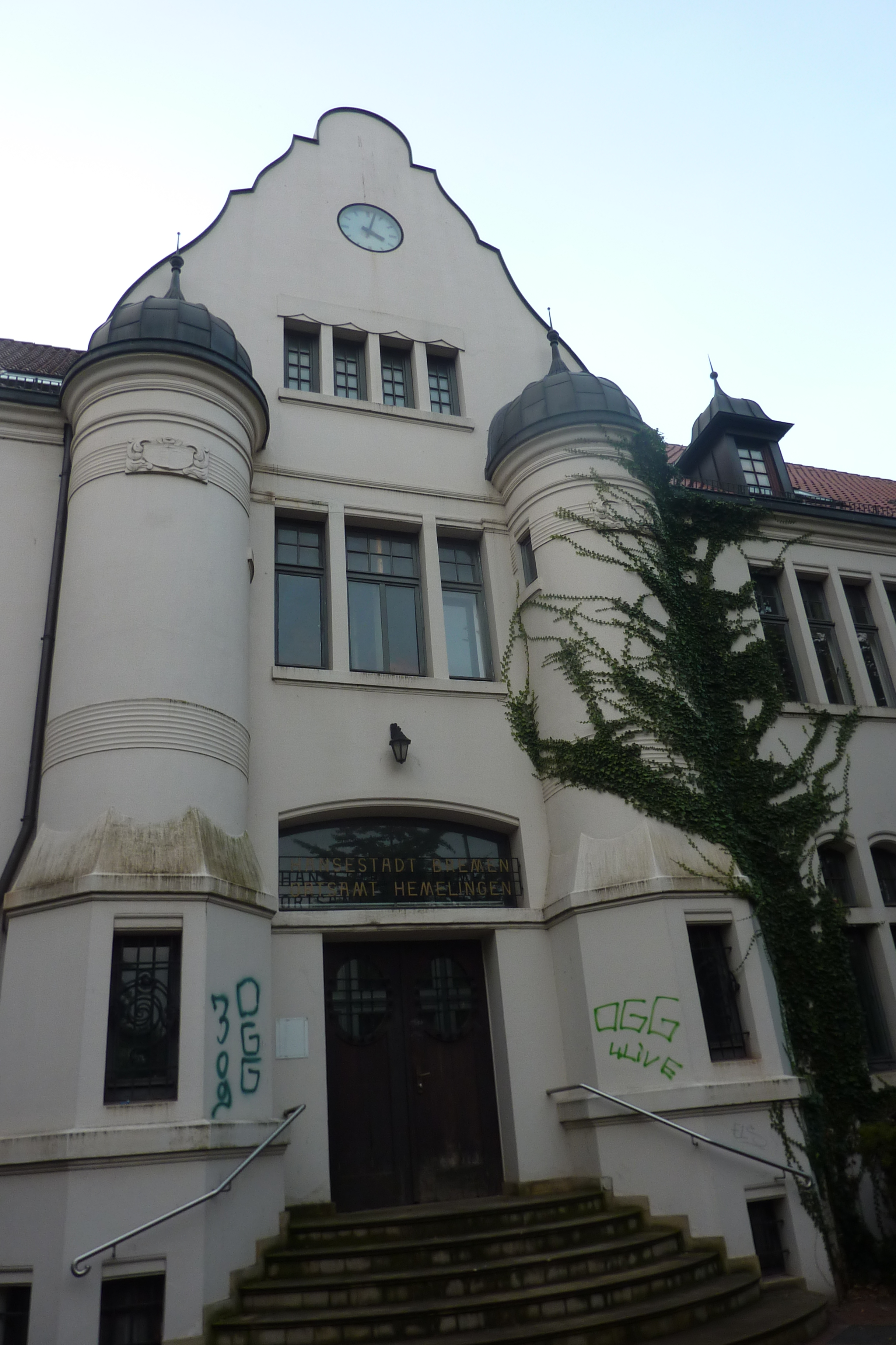 Rathaus Hemelingen in Bremen, Rathausplatz 1Das abgebildete Objekt ist ein geschütztes Kulturdenkmal in der Freien Hansestadt Bremen, mit der Nr. 0421 beim Landesamt für Denkmalpflege registriert.